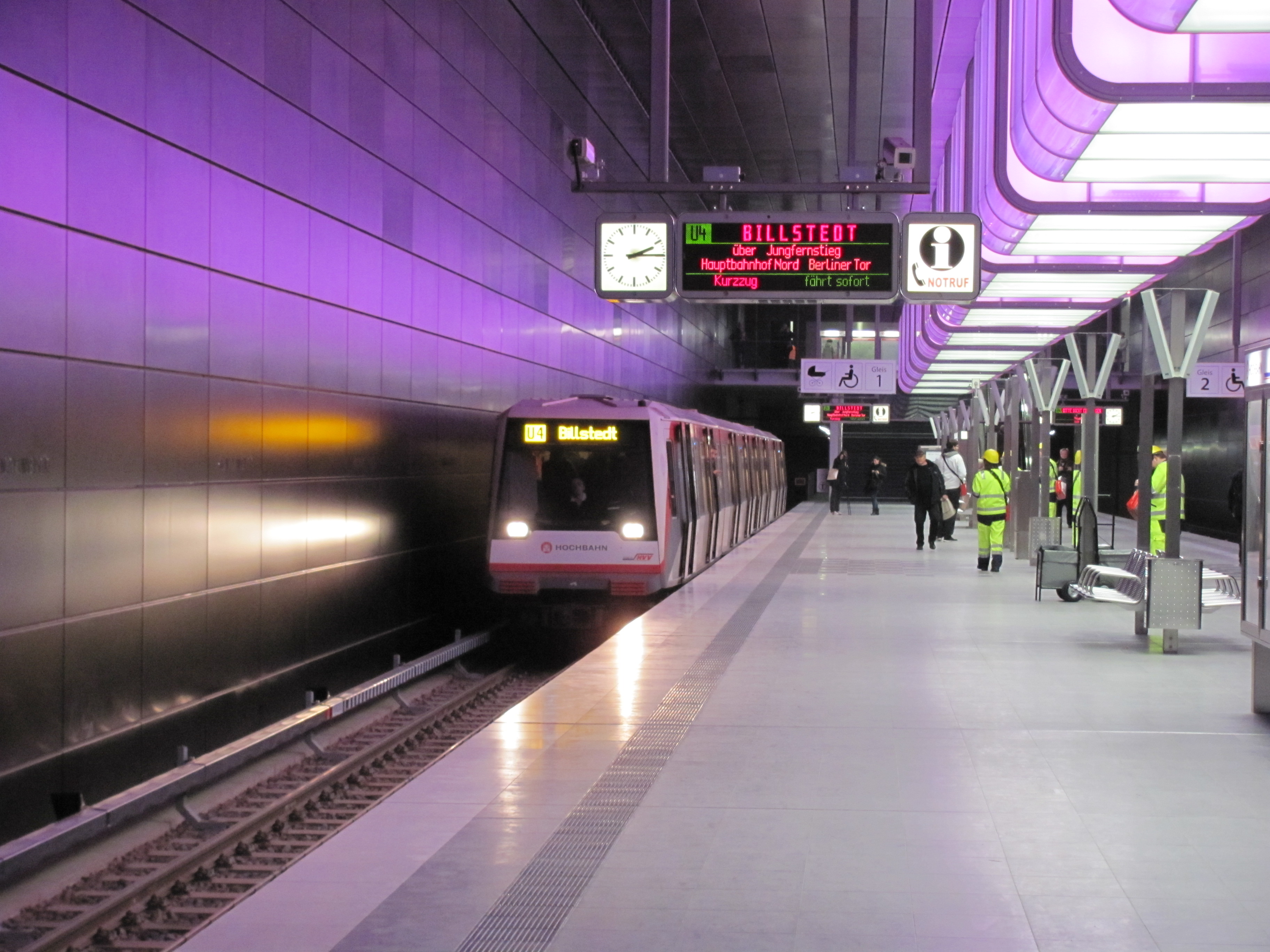 U-Bahnhof HafenCity Universität, Bahnsteig mit U-Bahn